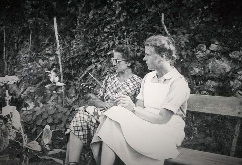 SRK Mitarbeiter im Schloss La Hille, Frankreich, 1941